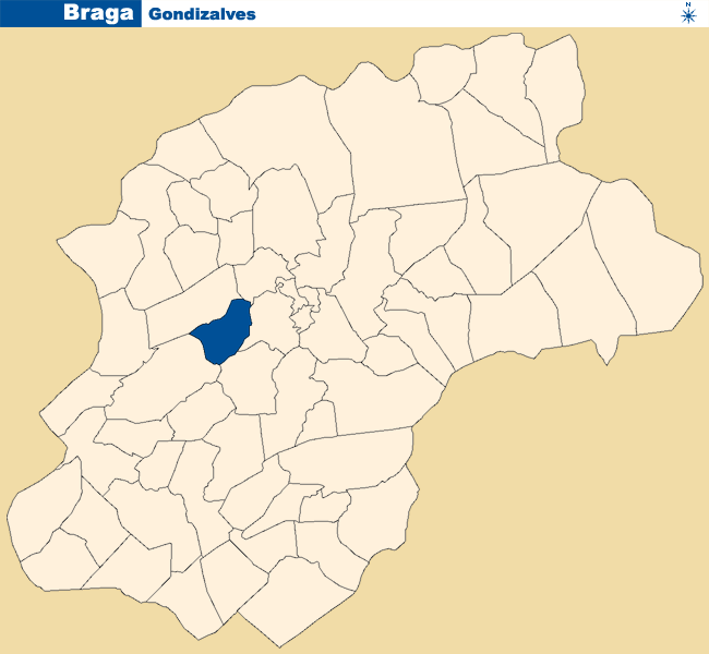 Localização de Gondizalves no concelho de Braga.